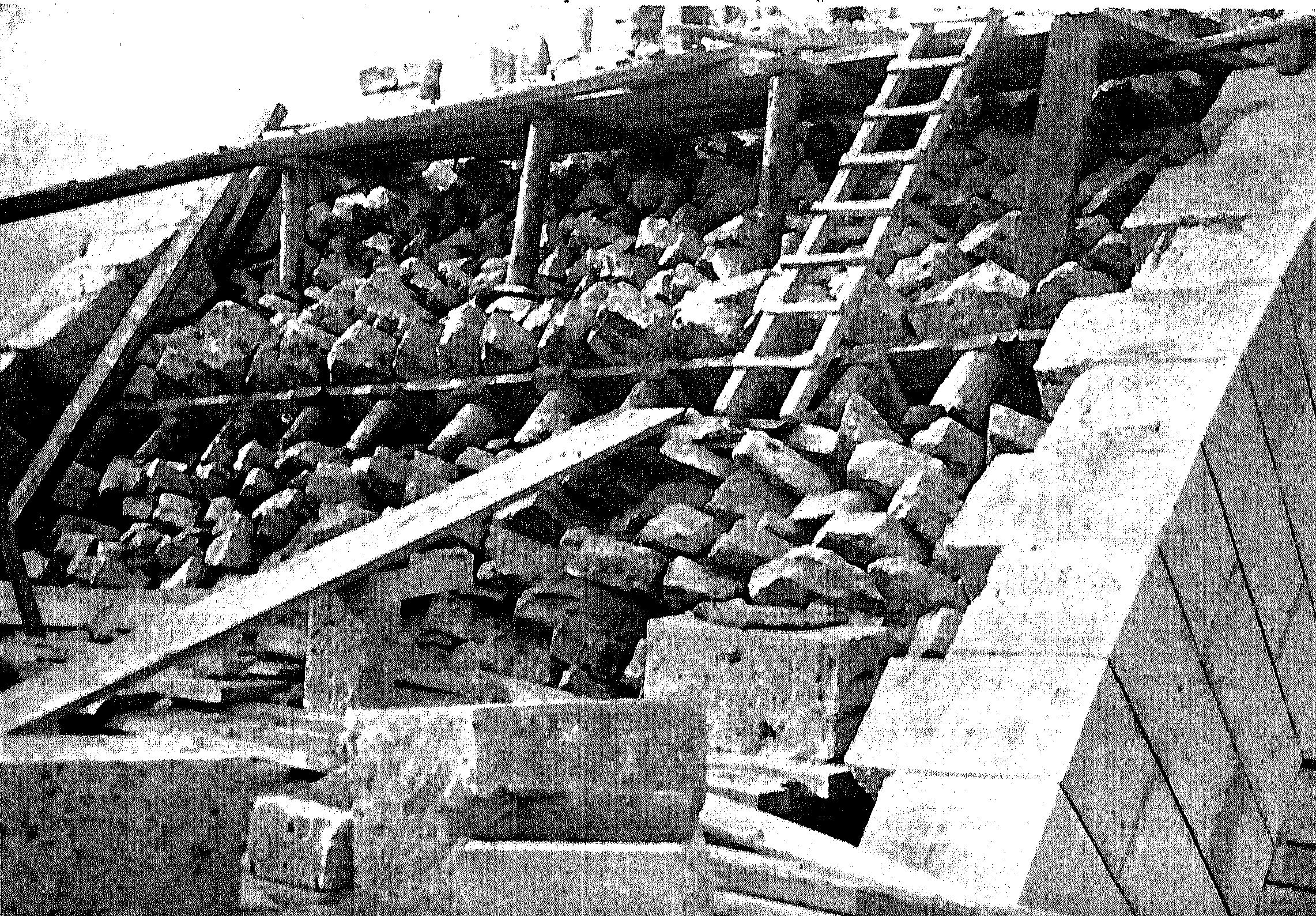 Queutage du pont d’Epinay-sur-Seine (11 avril 1906)